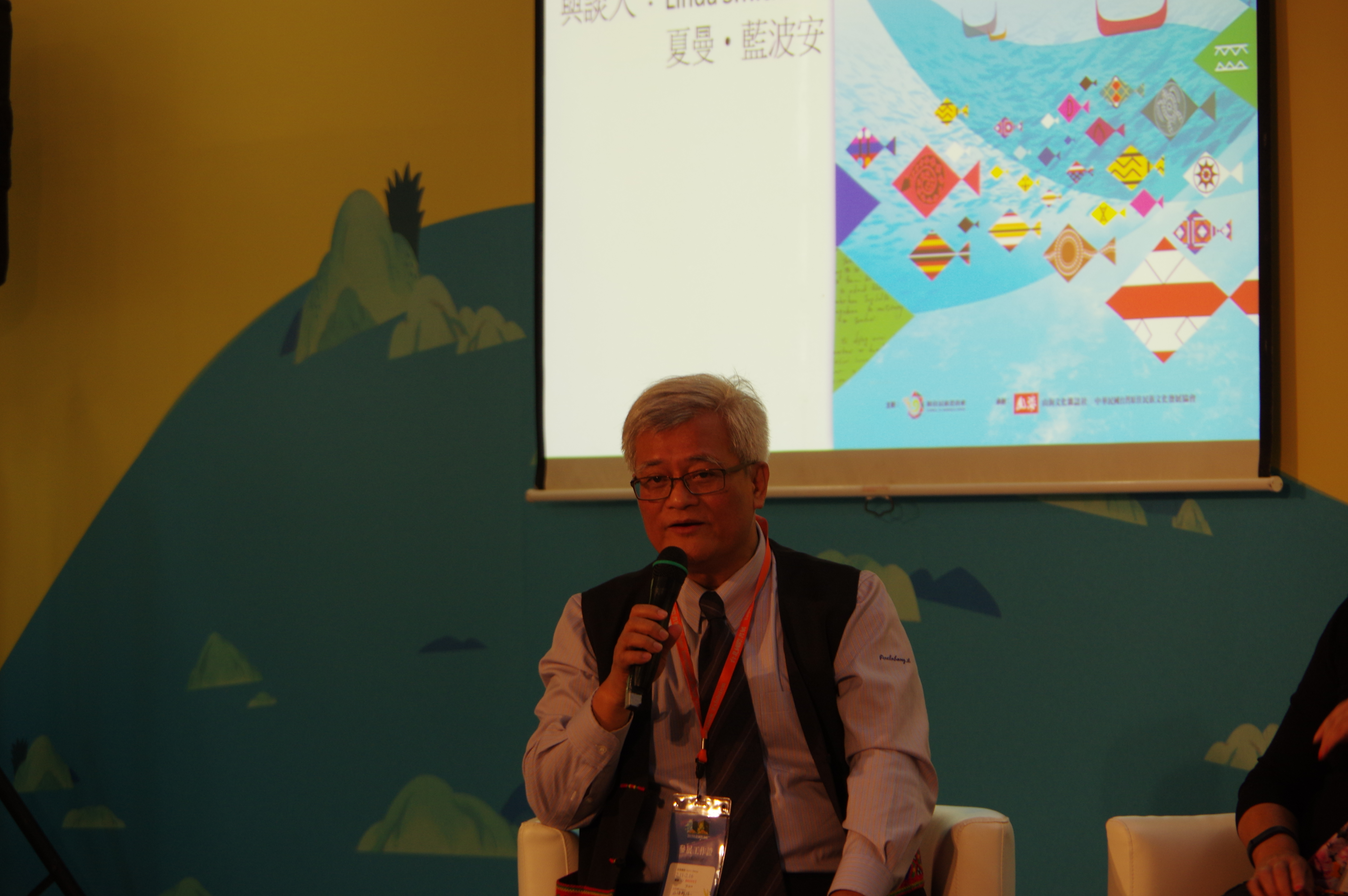 卑南族作家孫大川出席2015台北國際書展